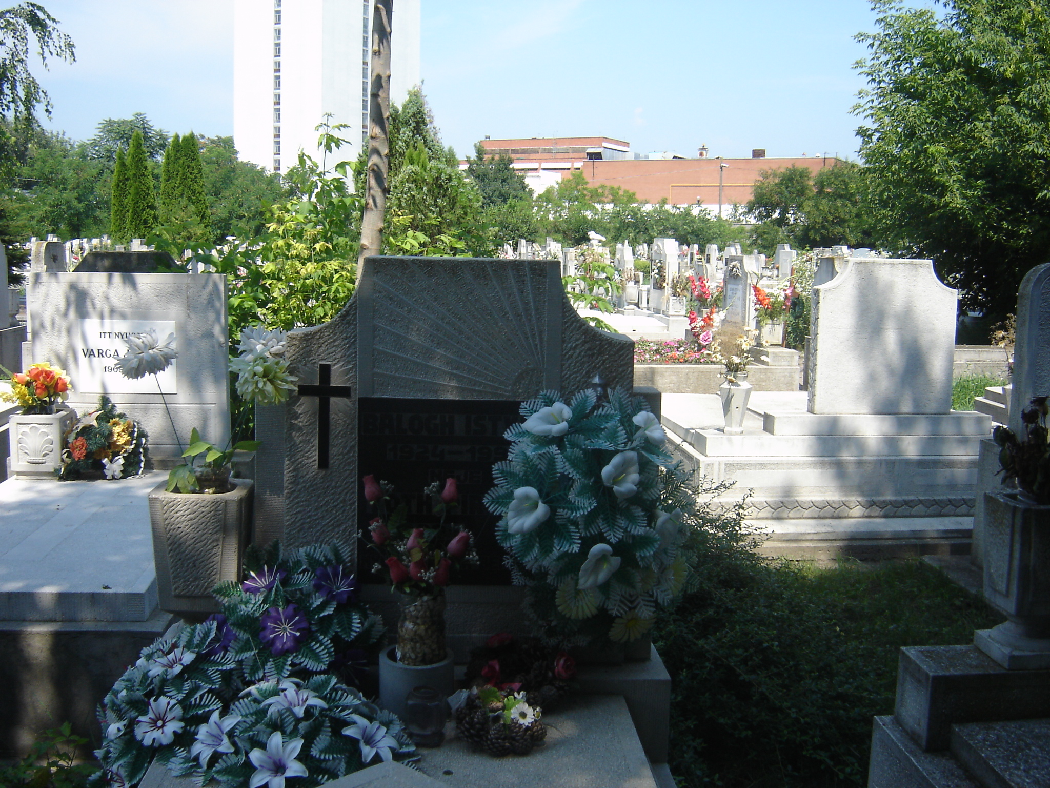 Népies neobarokk sírkő, még a díszítés is neobarokk (Szeged-alsóvárosi temető)